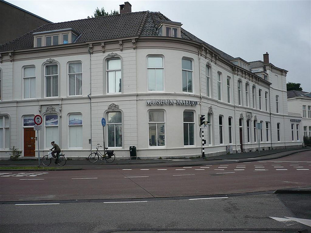 Museum Maluku in Utrecht, Nederlands